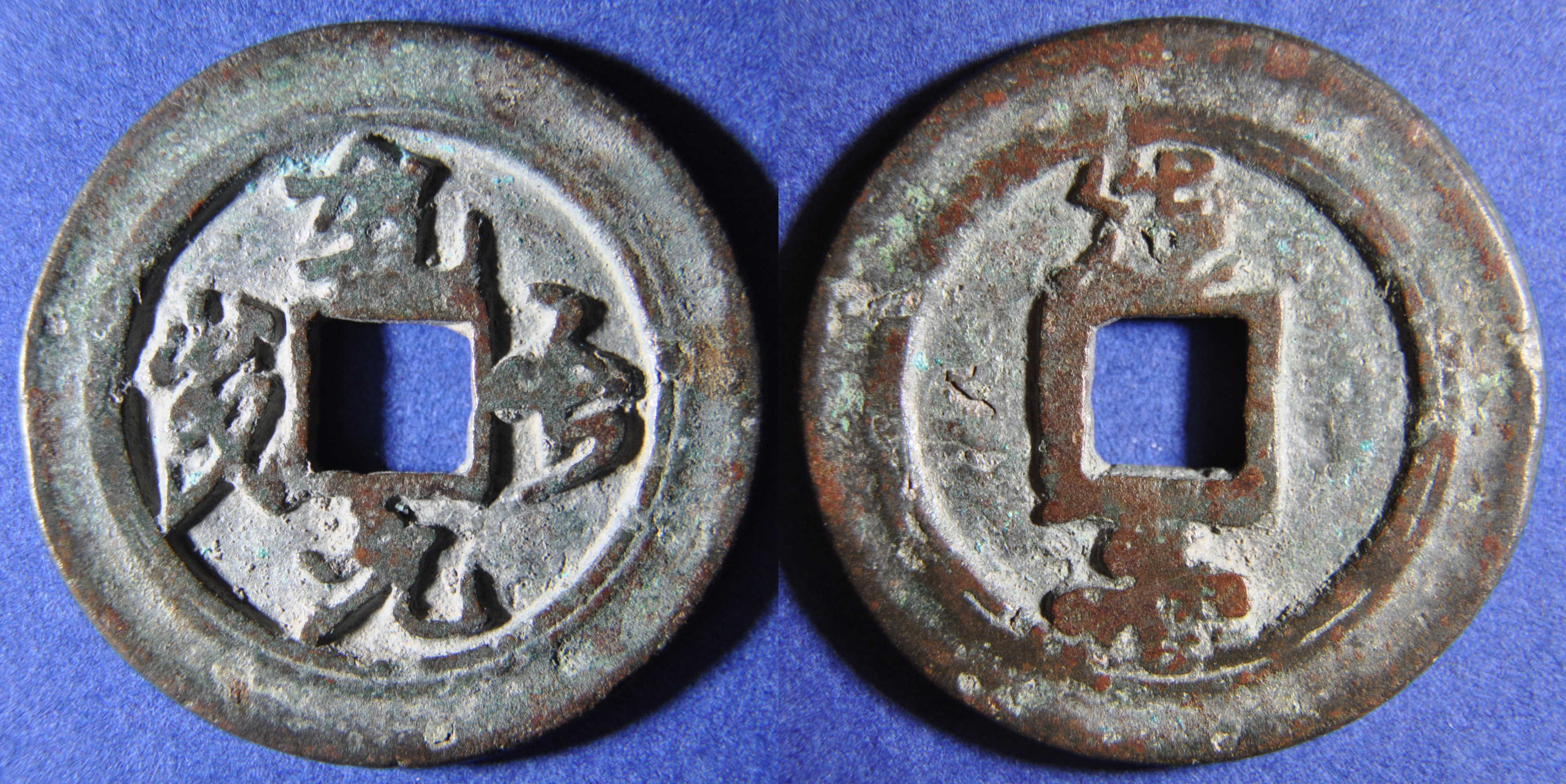 Une amulette vietnamienne du XVIIIe siècle. A/ Nguyen truong tien (en chinois Qian Yuan chang qian) (Monnaie perpétuelle du ciel) R/ tao nham ? Bronze Diamètre :35,43 mm Poids : 14,5 g. Double rebord comme sur les pièces de présentation Can Hung (1740-1784) des Le. Référence : Schroeder 605; BN72 (Amulettes de Chine et du Vietnam, F. Thierry, 1987) Indice de rareté : Rare